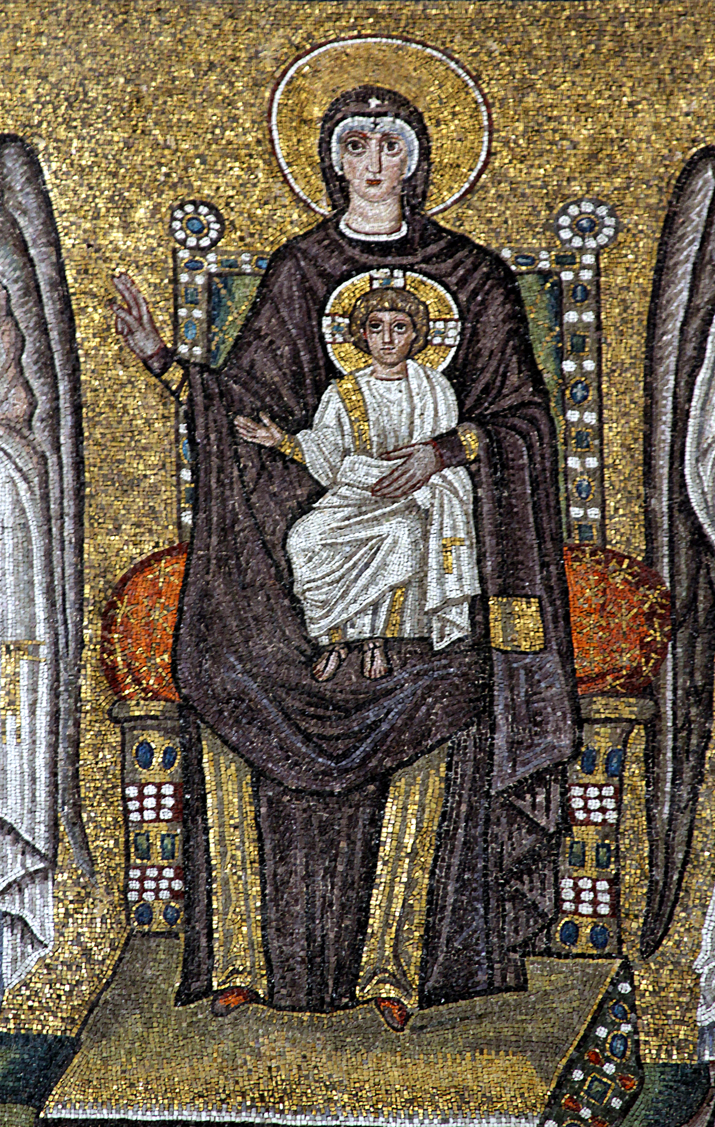 Sant'Apollinare Nuovo - Ravenna